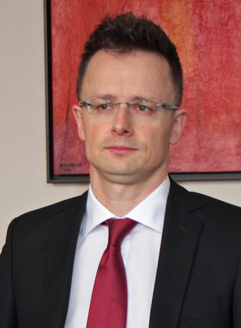 Quito, 25 mar (ANDES).- Péter Szíjjartó, ministro de asuntos exteriores y comercio de Hungría, visita Ecuador para fomentar lazos bilaterales de comercio. Fotogrfías: Carlos Rodríguez/ANDES.